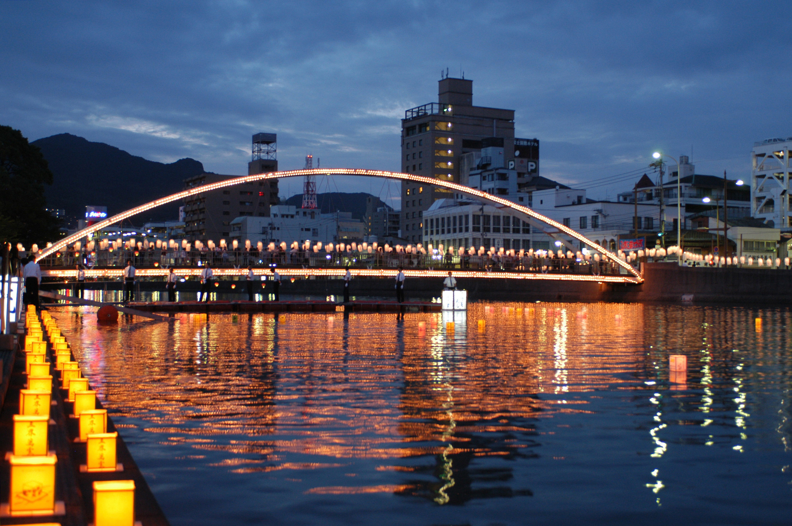 Sasebo Illuminated by the Albuquerque Bridge, Japanese volunteers place candle lit lanterns into the Sasebo River during Japan's annual Obon festival, Sasebo, Japan, Aug. 15, 2004. The festival originated in the 7th century and is held to honor the souls of loved ones who have passed away. (U.S. Navy photo by Photographer's Mate 3rd Class Ian W. Anderson) (Released) Photo by: PH3 IAN W. ANDERSON, FLTIMAGFACPAC SASEBO JA Record ID No. (VIRIN): 040815-N-8937A-023